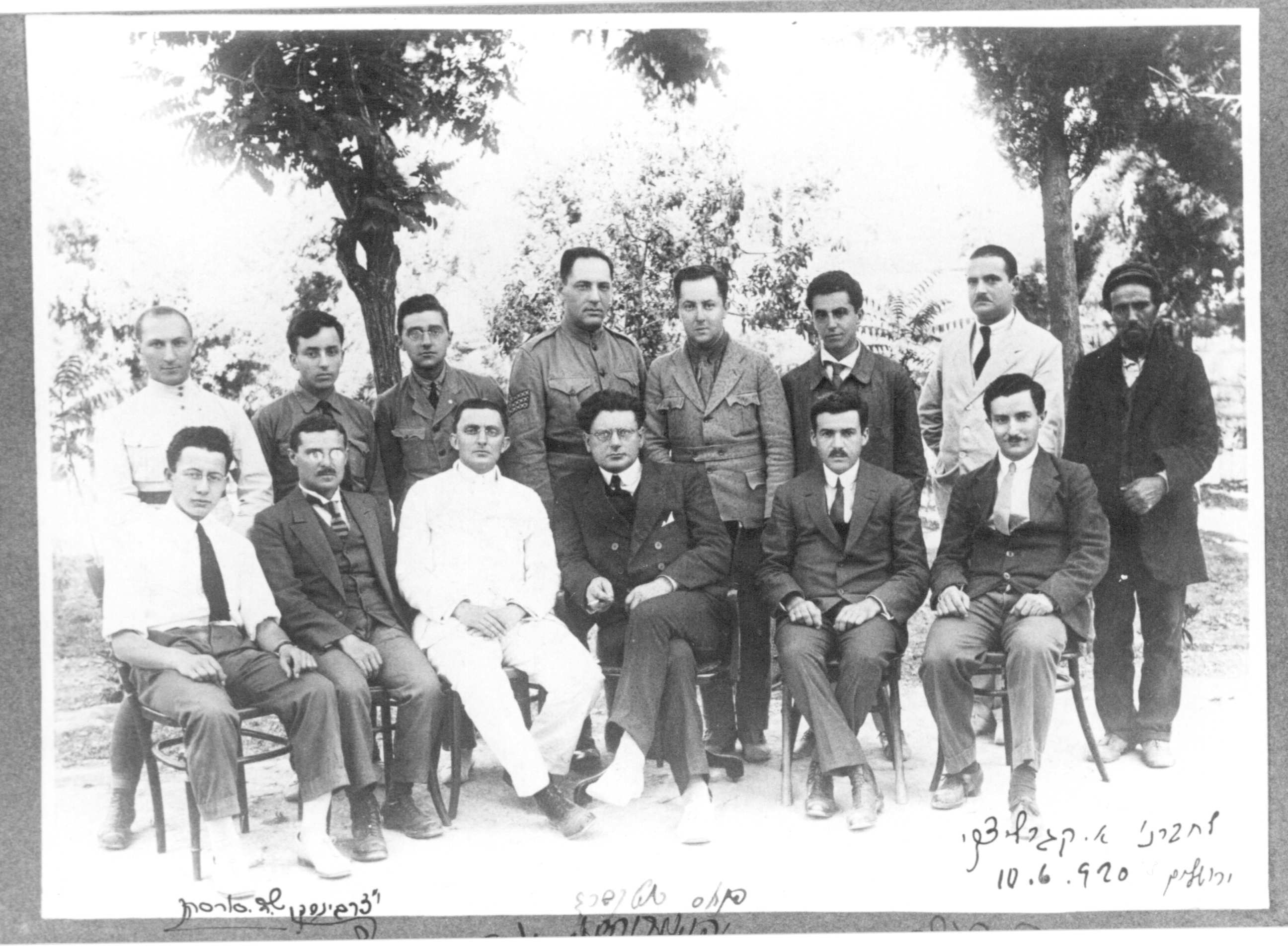 תמונה קבוצתית של פנחס רוטנברג ועובדיו, 1920